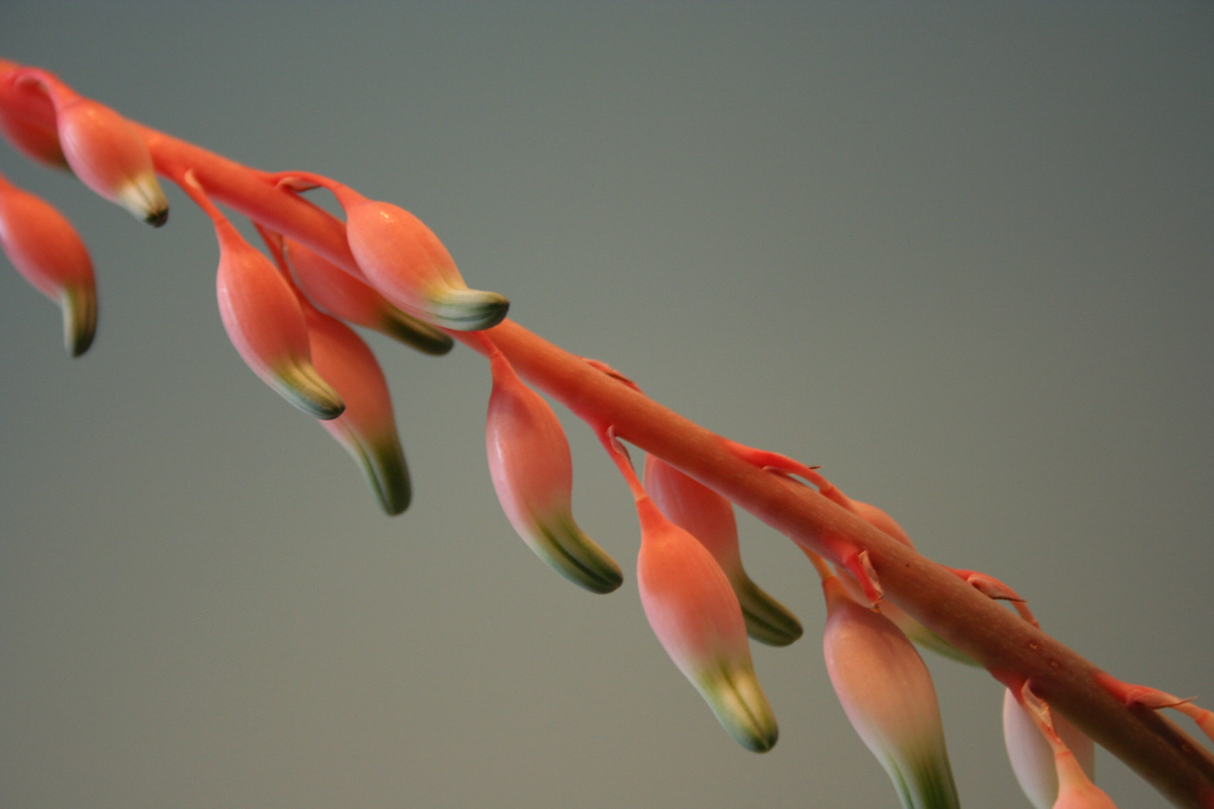 Gasteria carinata - flowers